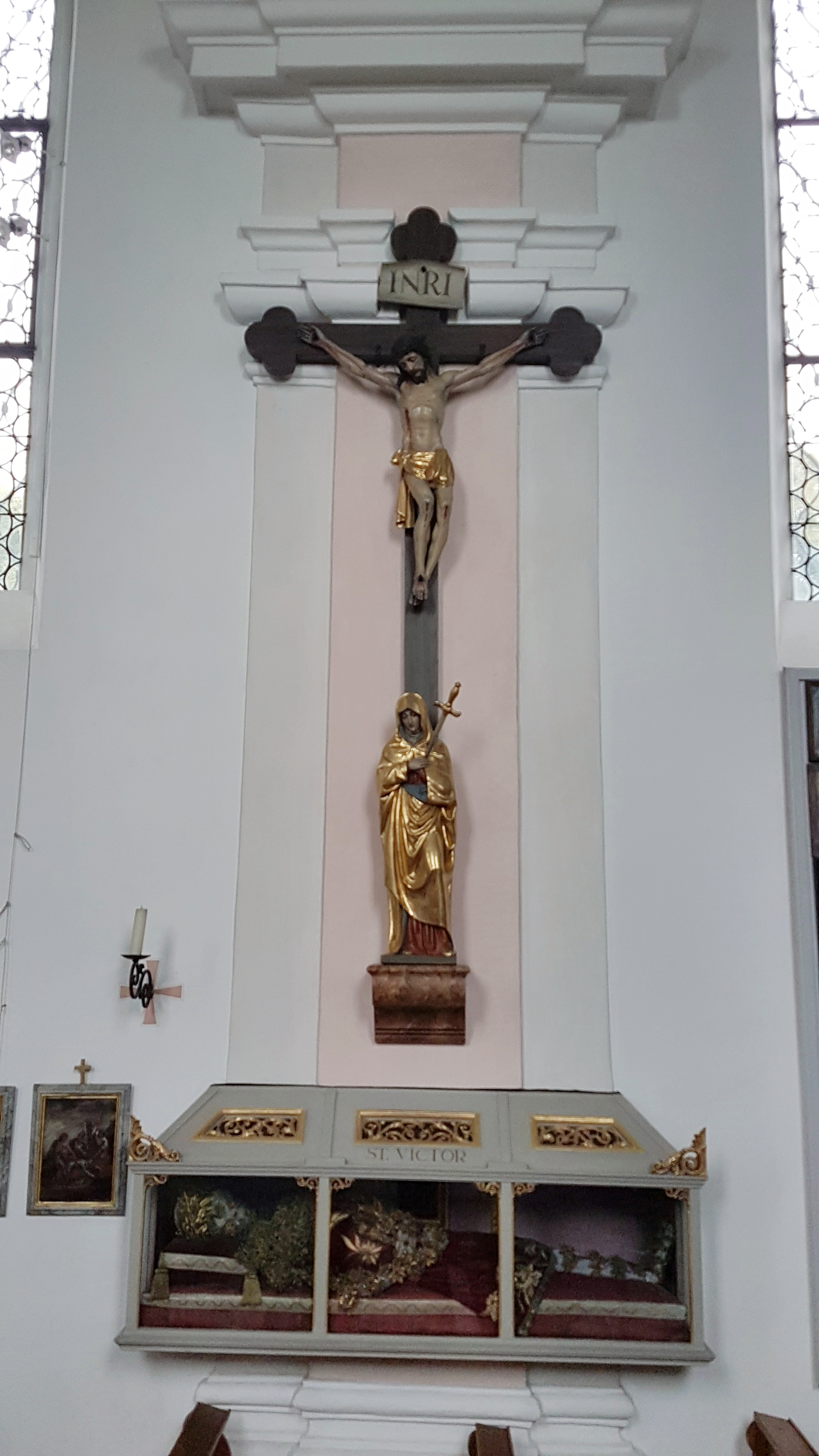 Mariä Heimsuchung (Mühlberg, Waging am See)